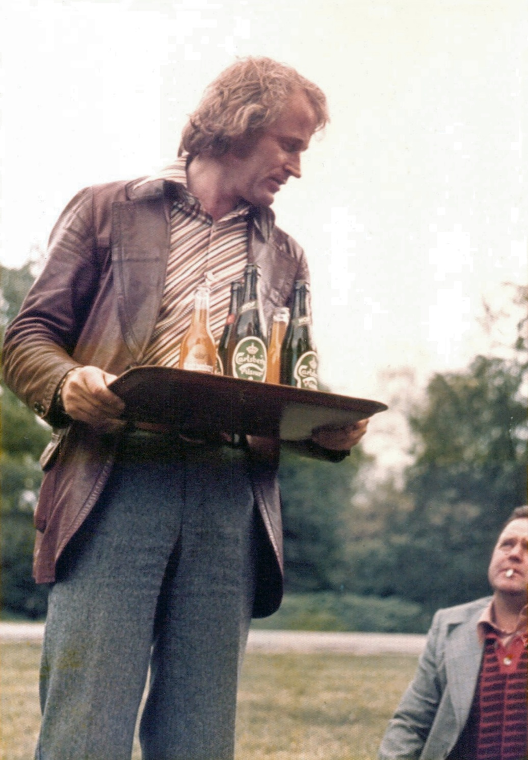 Sydslesvigeren Heinrich Schultz, født 12. november 1938, fotograferet på en skoleudflugt til Knuthenborg Dyrepark i foråret 1976. Nederst til højre i billedet ses skolebuschauffør Karl Hermann Schwerdt, Garding.